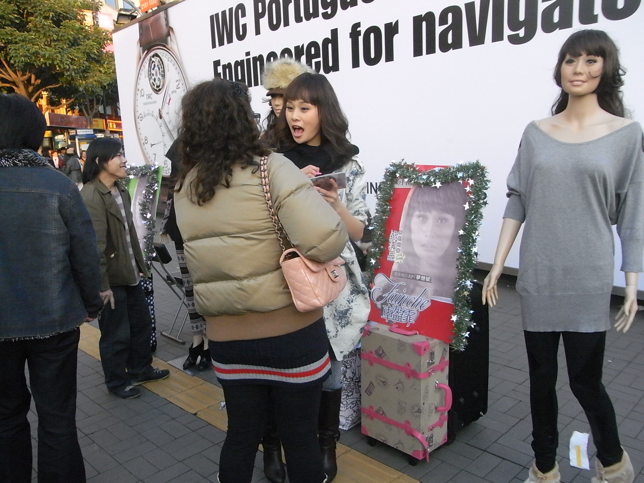 車盈霏